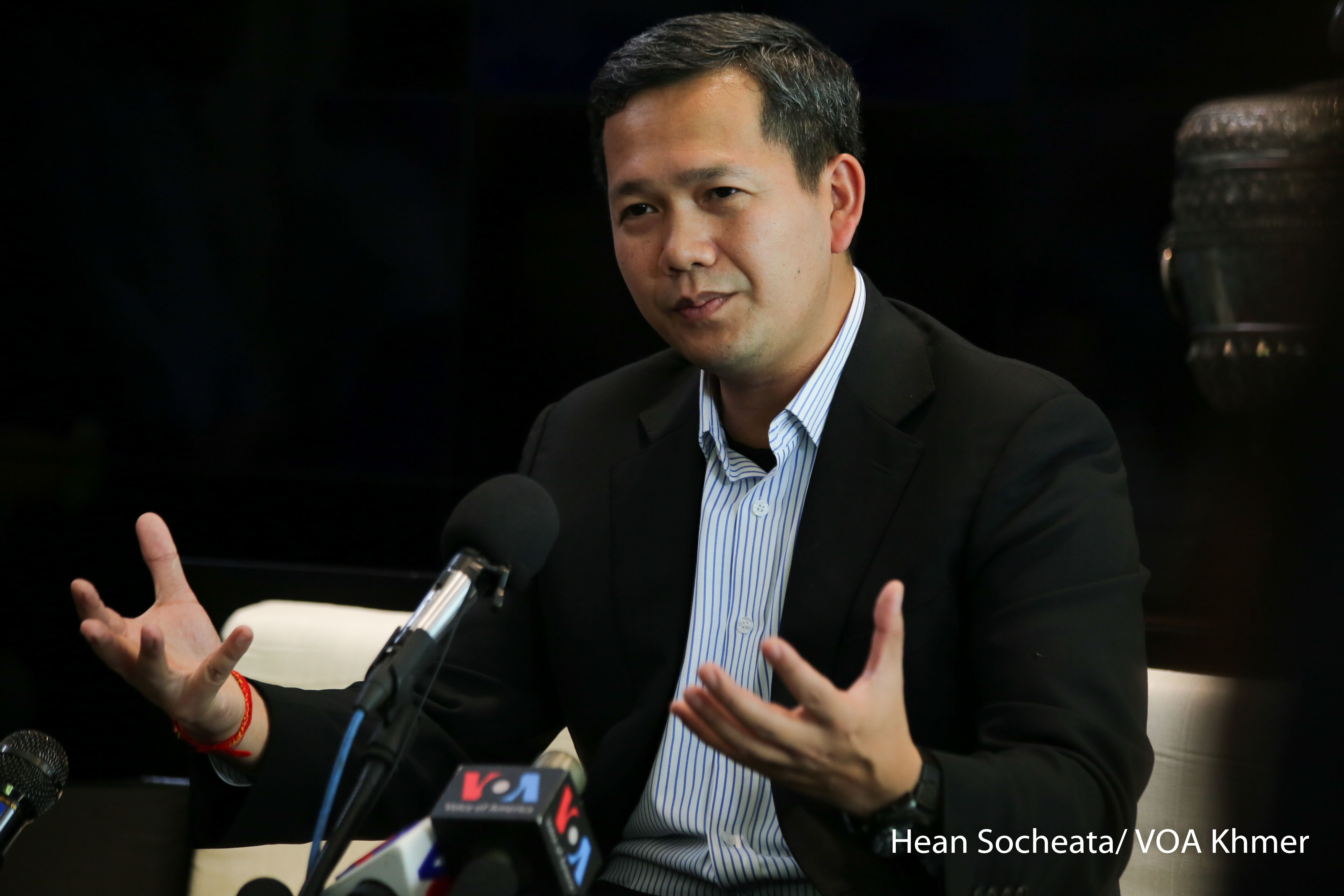 Prime Minister Hun Sen’s eldest son, Lieutenant General Hun Manet. (Photo: Hean Socheata/VOA Khmer)